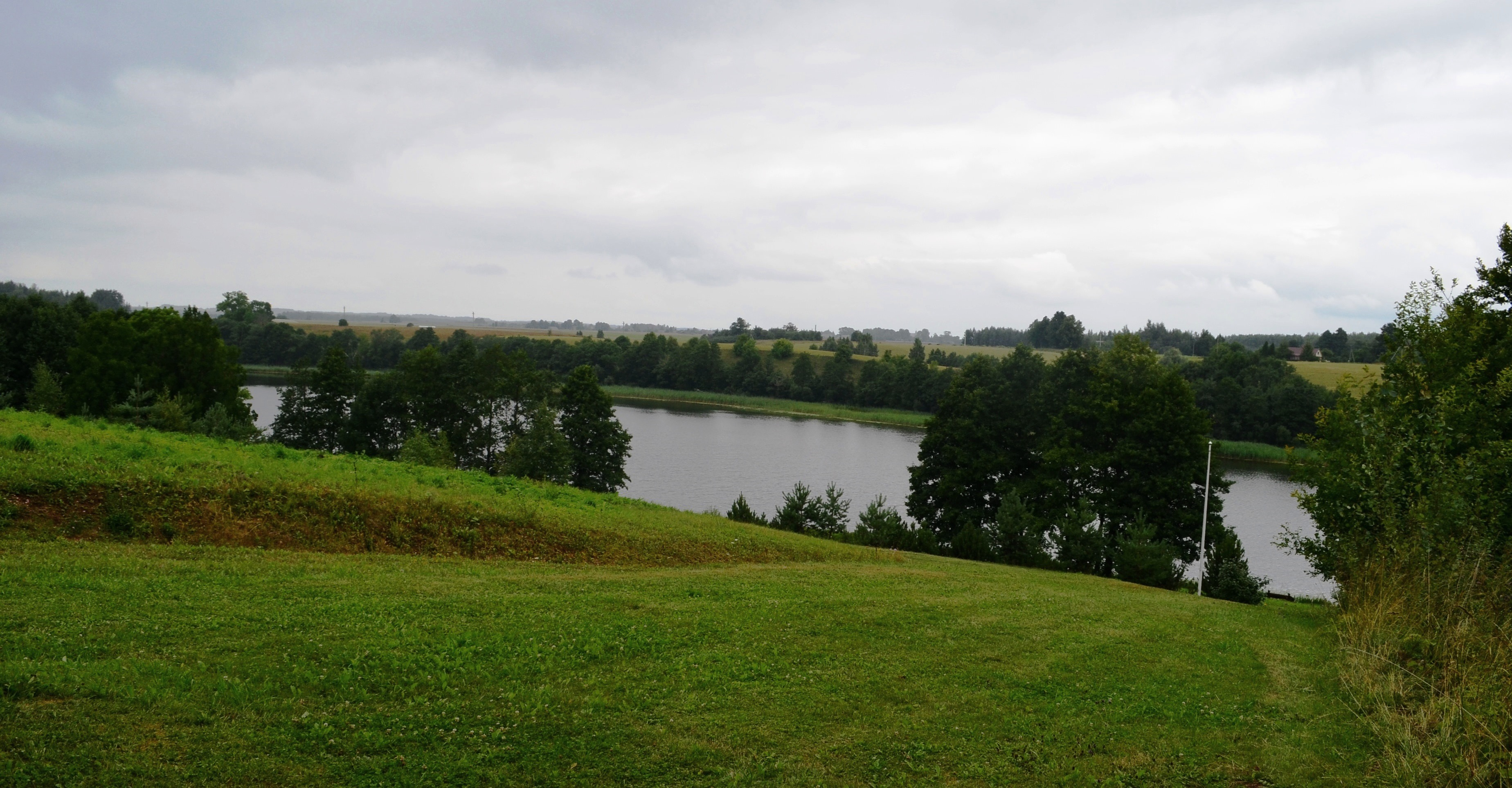 Sartų ežero įlanka ties Bobriškiu, Rokiškio r.